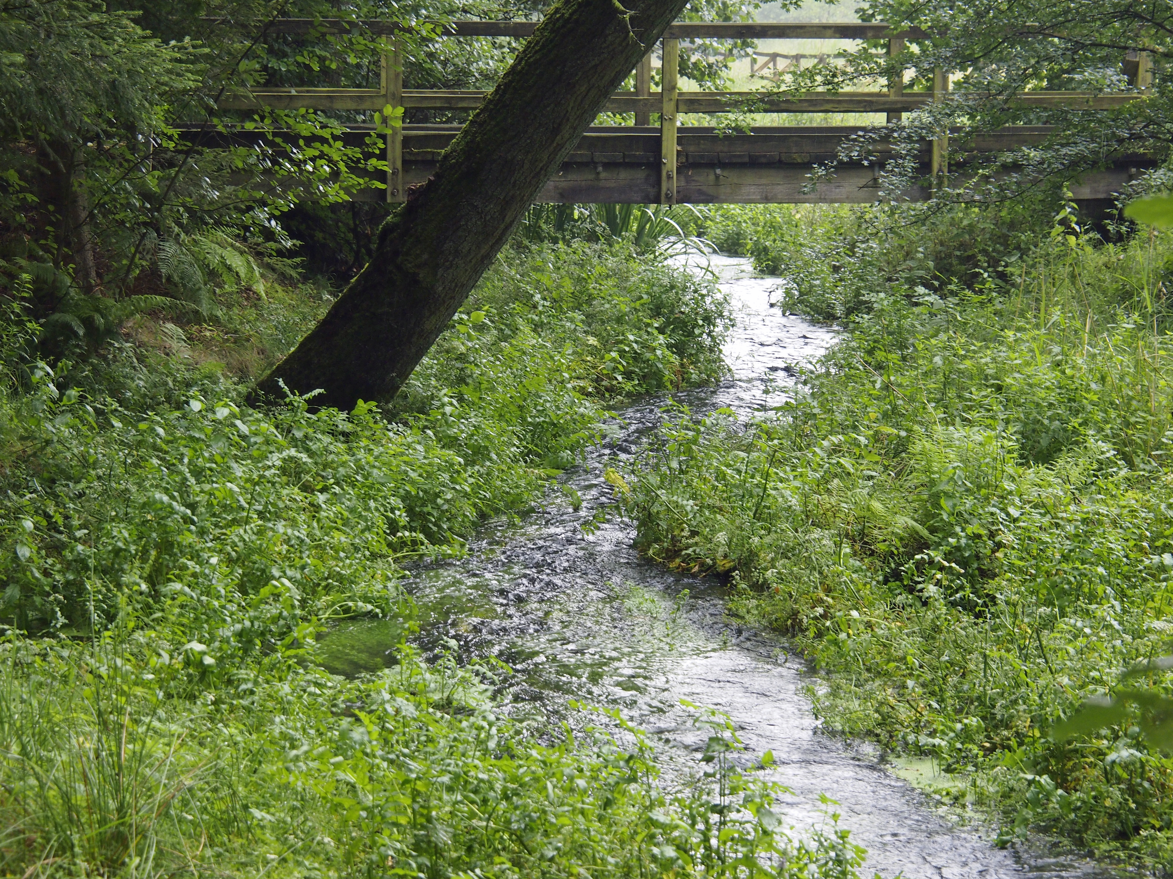 Sohlgleite an der Sültinger Mühle auf dem Truppenübungsplatz Munster-Süd